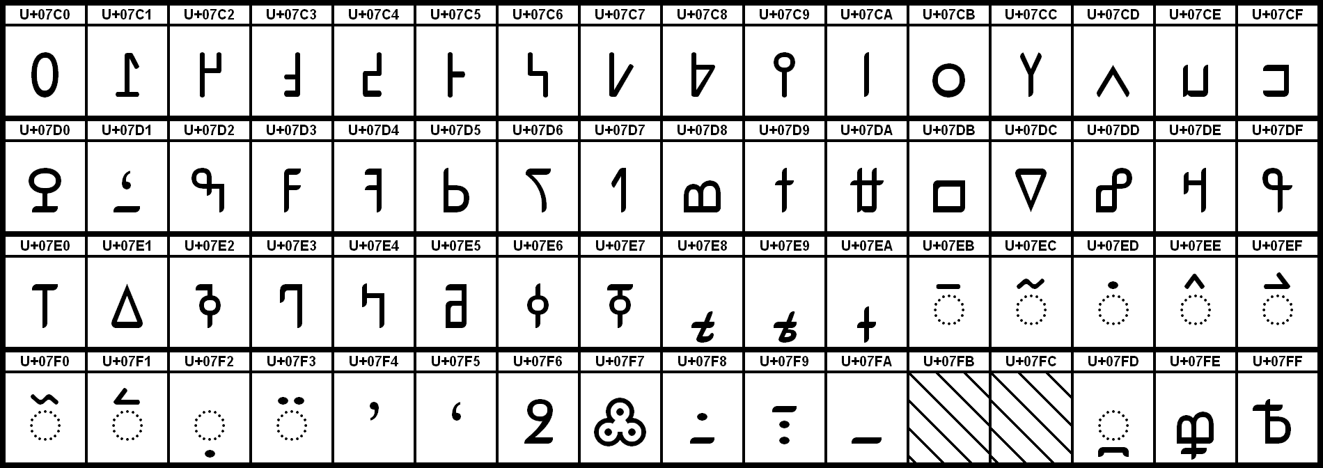 Grafiktafel für den Unicodeblock N’Ko.